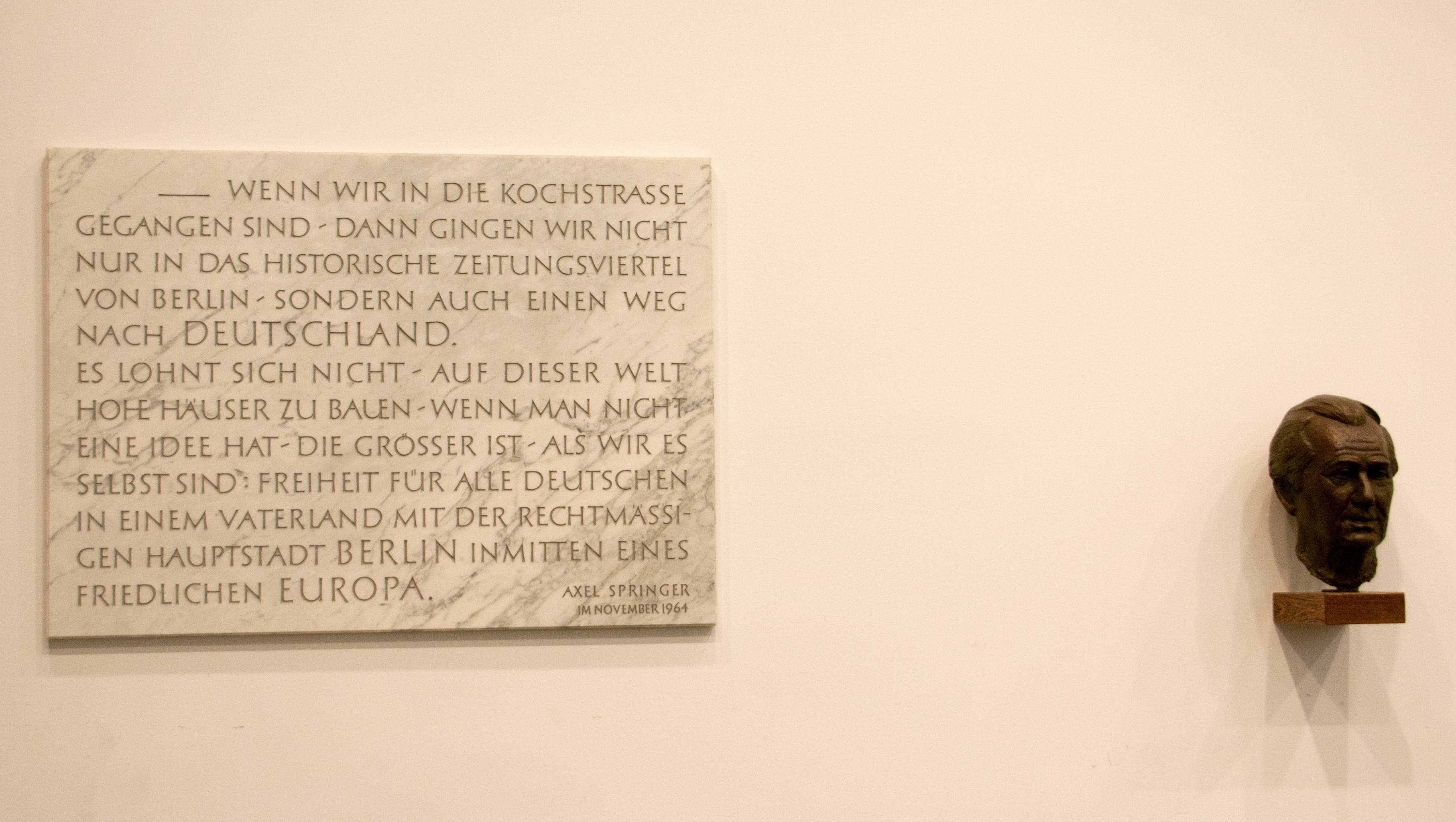 Wikipedia Stammtisch Berlin zu Besuch im Springer- Hochhaus